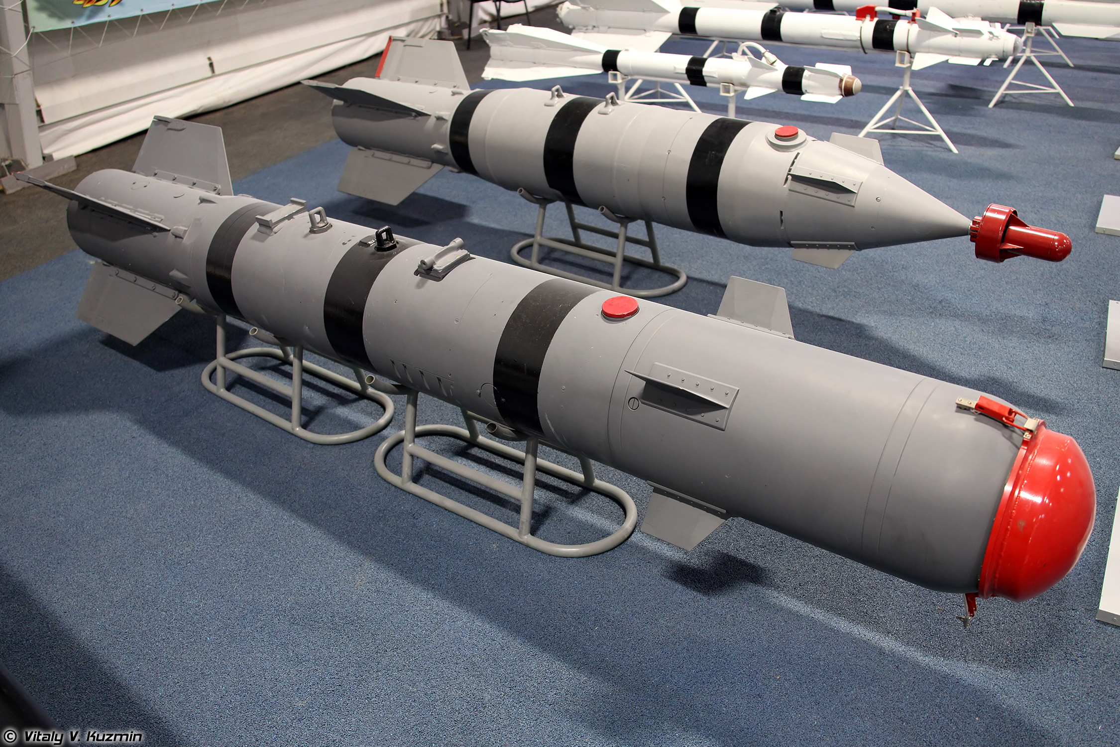 Корректируемая авиационная бомба КАБ-500Кр